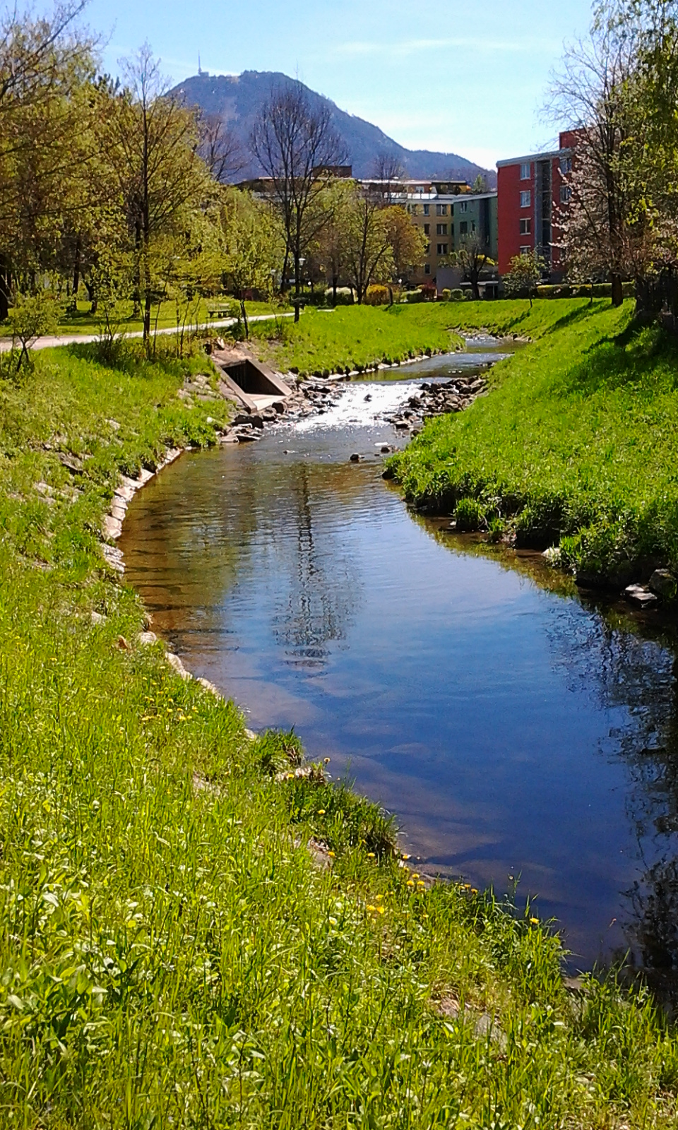 Alterbach in Salzburg-Itzling